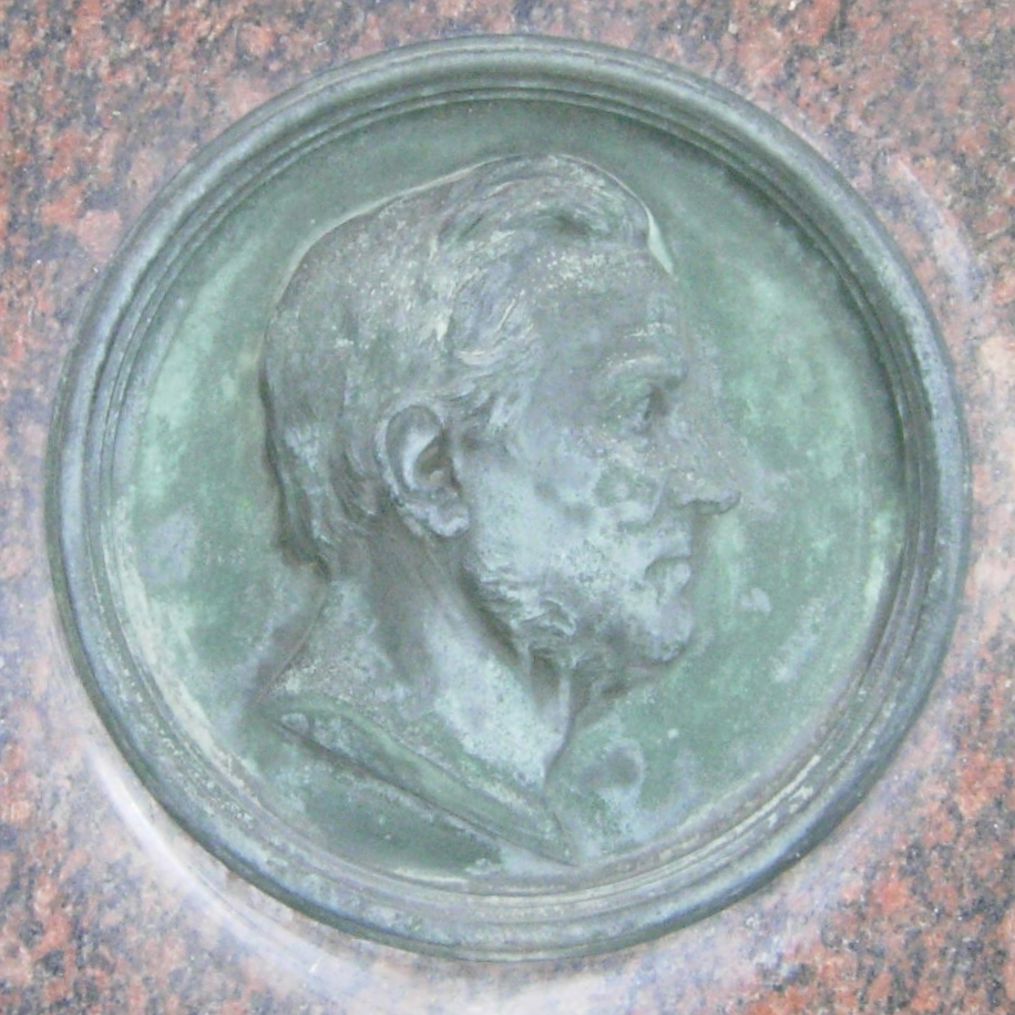 Albert Küppers: Bronze-Medaillon (1887) für den Sanitätsrat Franz Richarz (1812 – 1887) auf dem Alten Friedhof Bonn; Richarz hatte 1844 eine Pflegeanstalt in Bonn-Endenich eröffnet (vgl. Schumann-Haus), sein bekanntester Patient war Robert Schumann